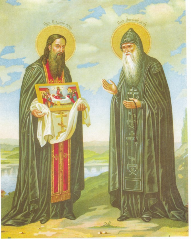 Преподобні Антоній і Феодосій Категорія:Зображення:Релігія